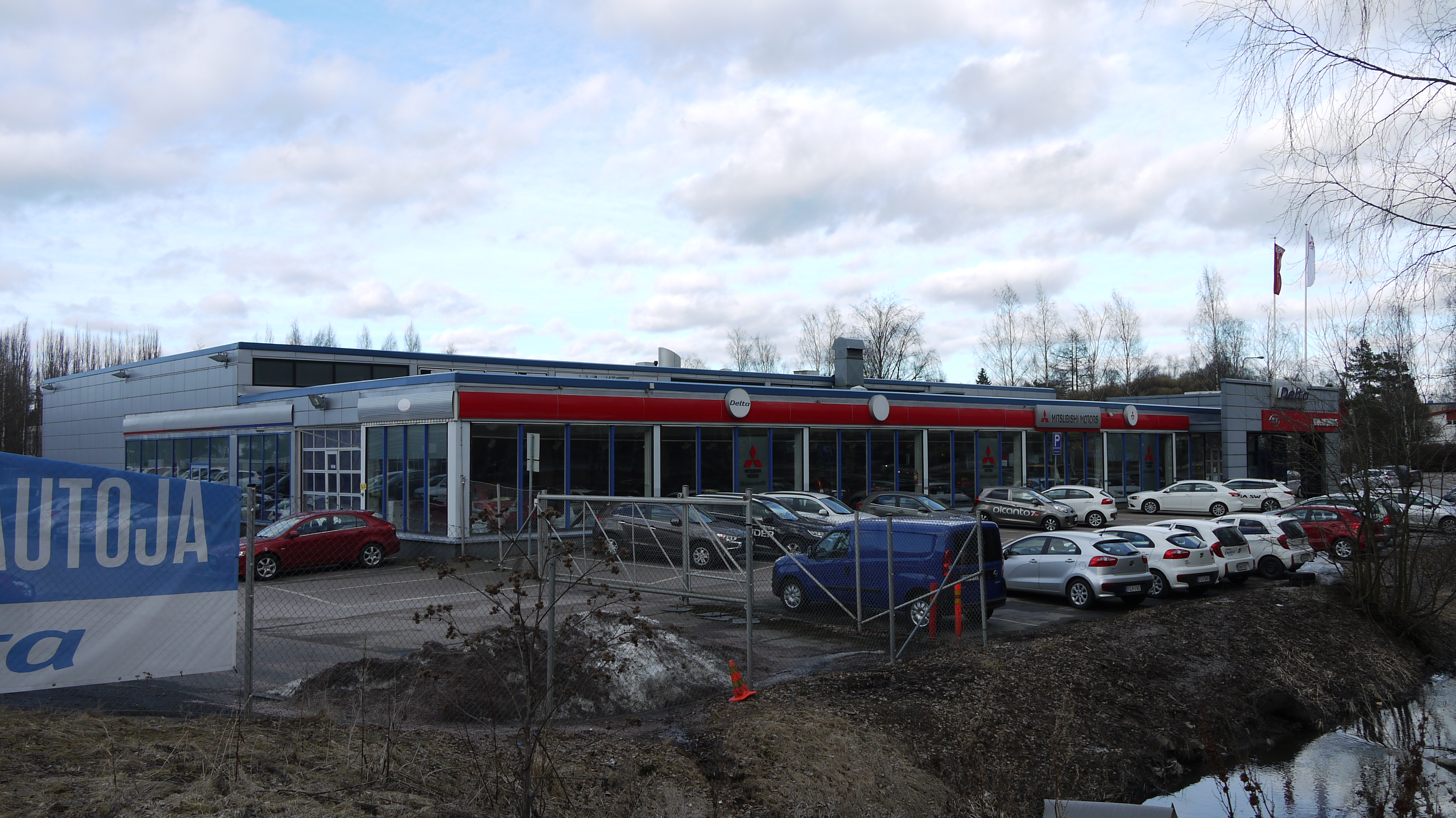 Delta Auton myymälä Espoon Niittykummussa maaliskuussa 2017. Myymälän paikalle on suunniteltu kaavoitettvan kerrostaloasuntoja.